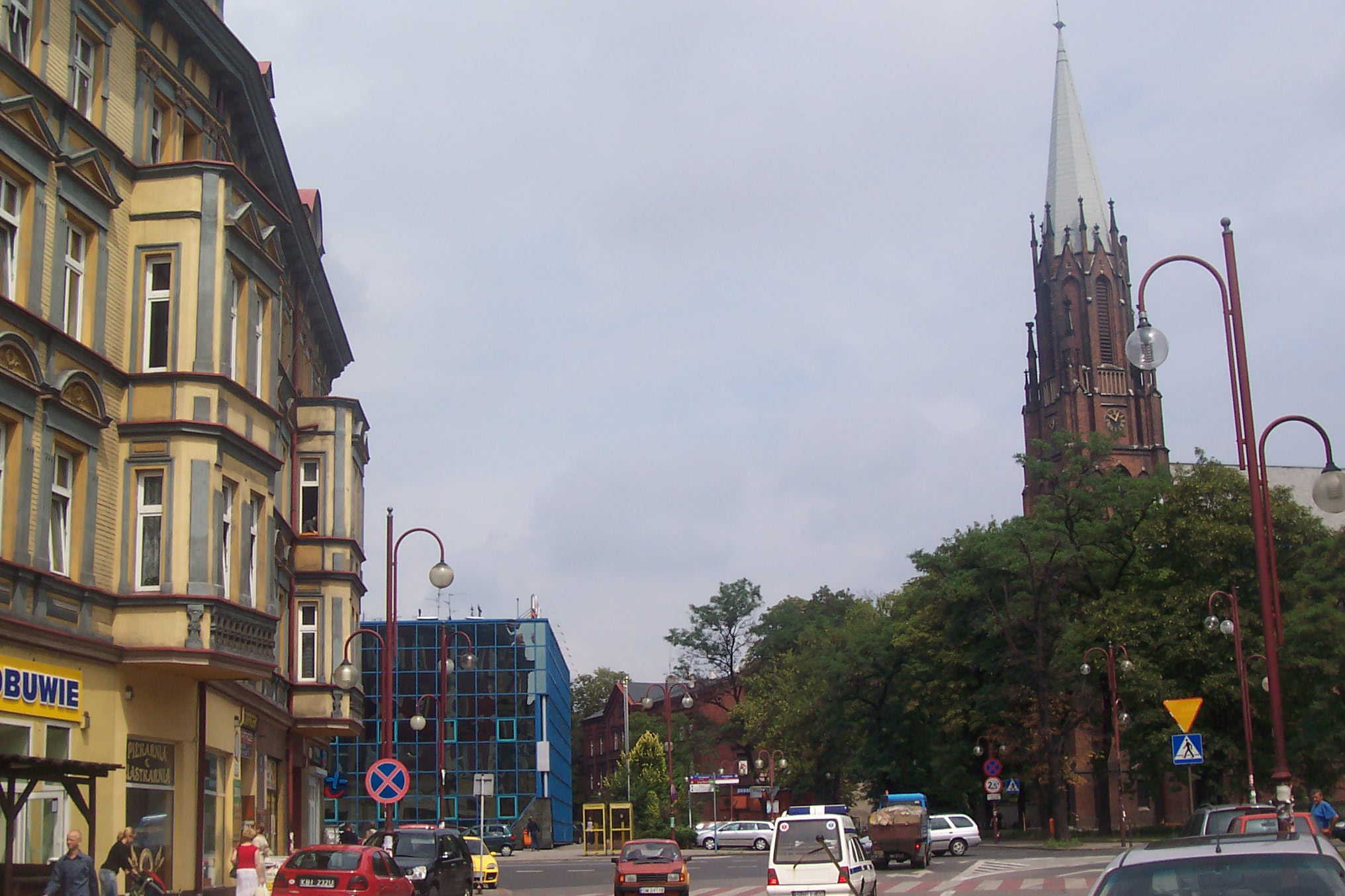 Centrum Siemianowic Śląskich